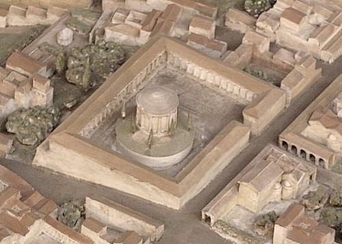 Temple de la gens Flavia